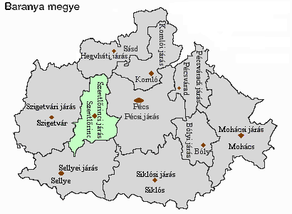 Magyarország, Baranya megye, Szentlőrinci járás